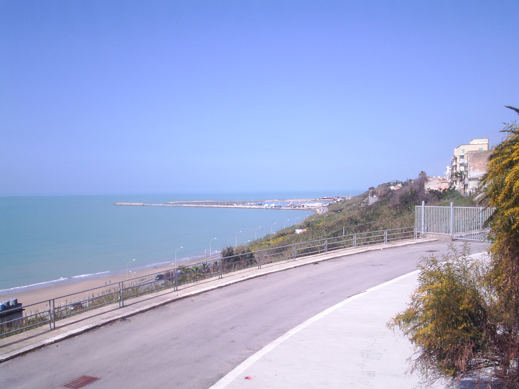 Autore: Valerio De Carlo; Fonte: scattata da me il 6 aprile 2007; descrizione: veduta del porto rifugio dalla villa comunale "G. Garibaldi"; Licenza d'uso: libera; Note: Gela è stupenda.